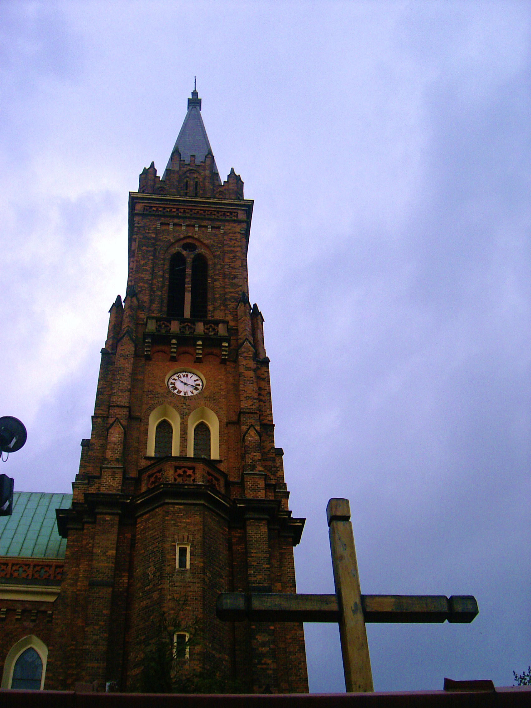 Parafia Wniebowzięcia NMP w Łodzi